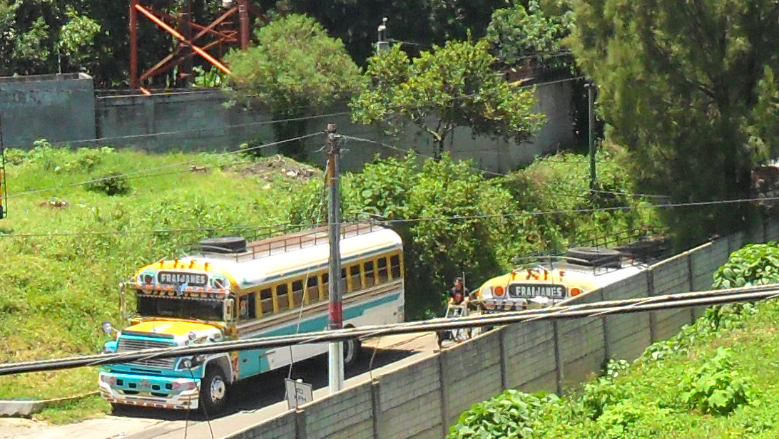 Autobus de Fraijanes, extraubano